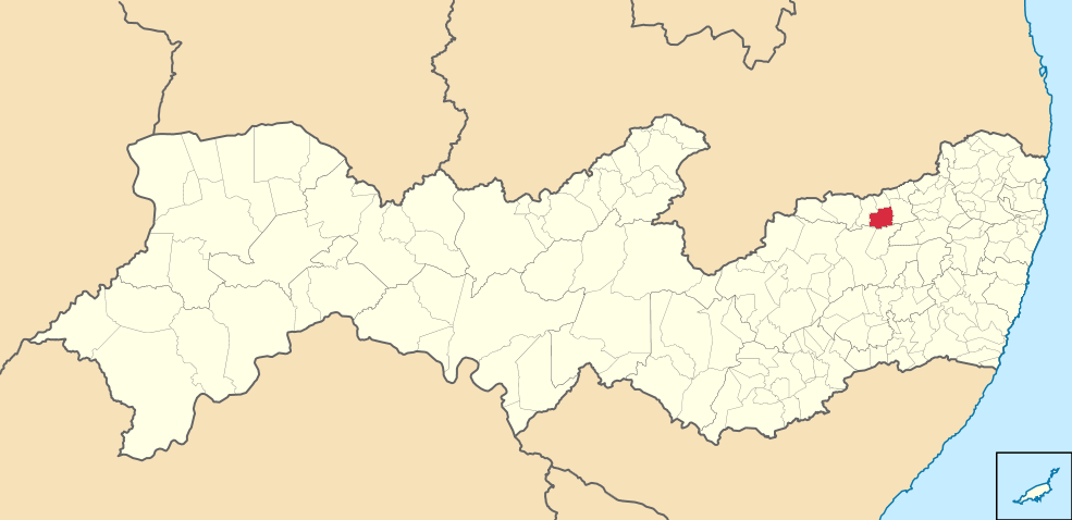 Mapa de Frei Miguelinho (2)